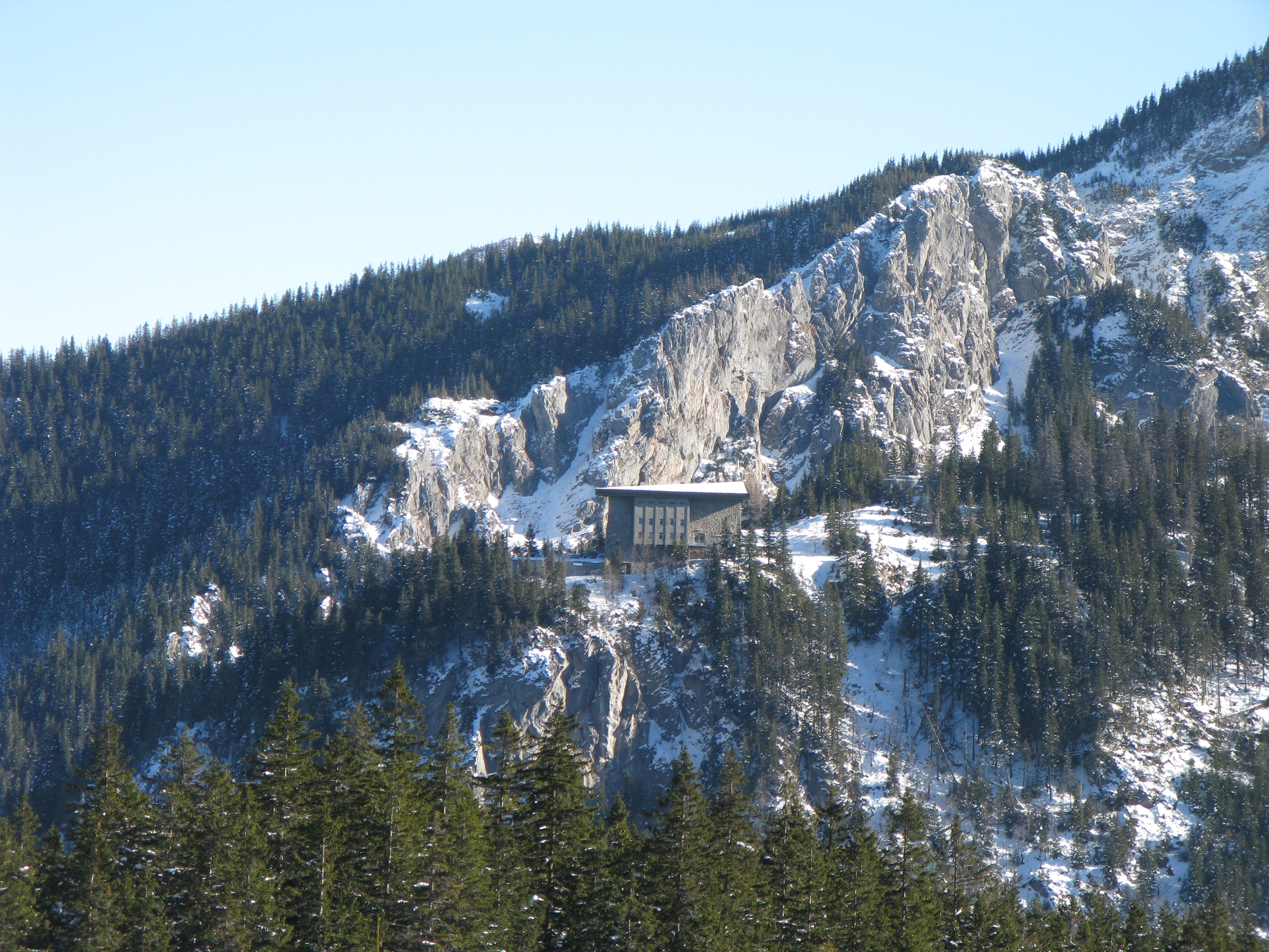 Widok na Myślenickie Turnie z Hali Kondratowej